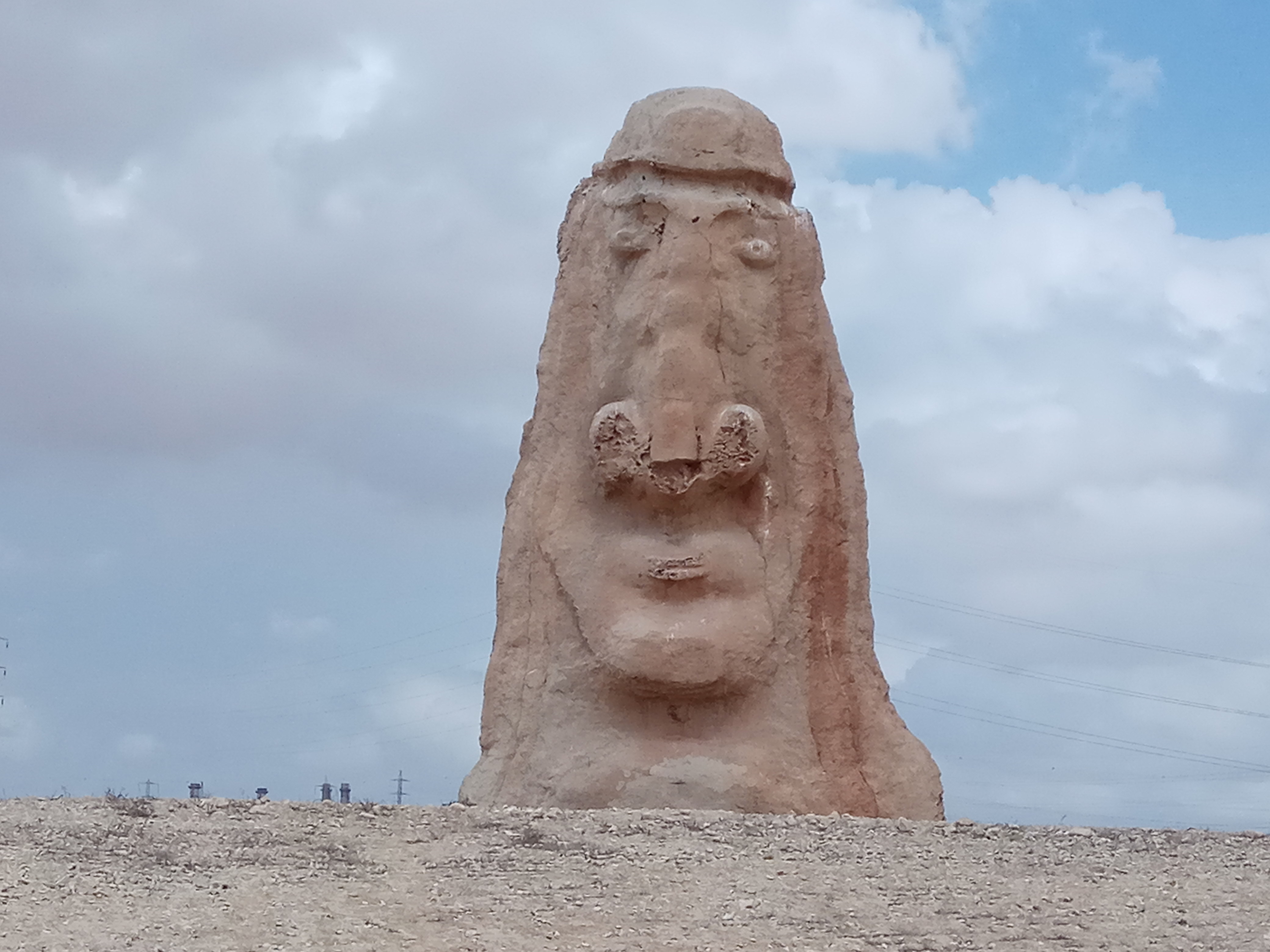 פסל שומר הנגב מול נאות חובב בנגב